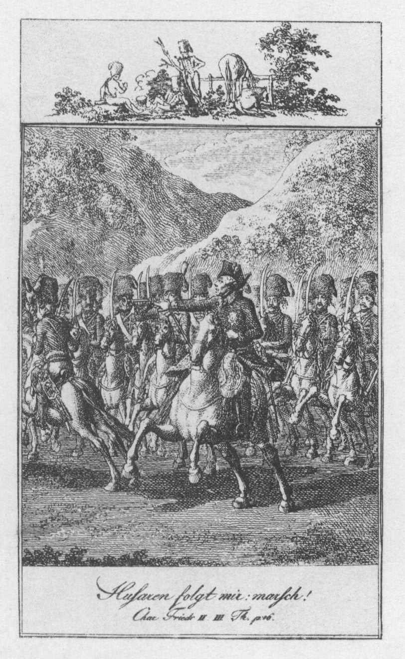 Vier Blätter zu Stein's Characteristik Friedrichs II. (Beschreibung lt. Quelle) Blatt 1 Blatt 2 Blatt 3 Blatt 4 der Serie